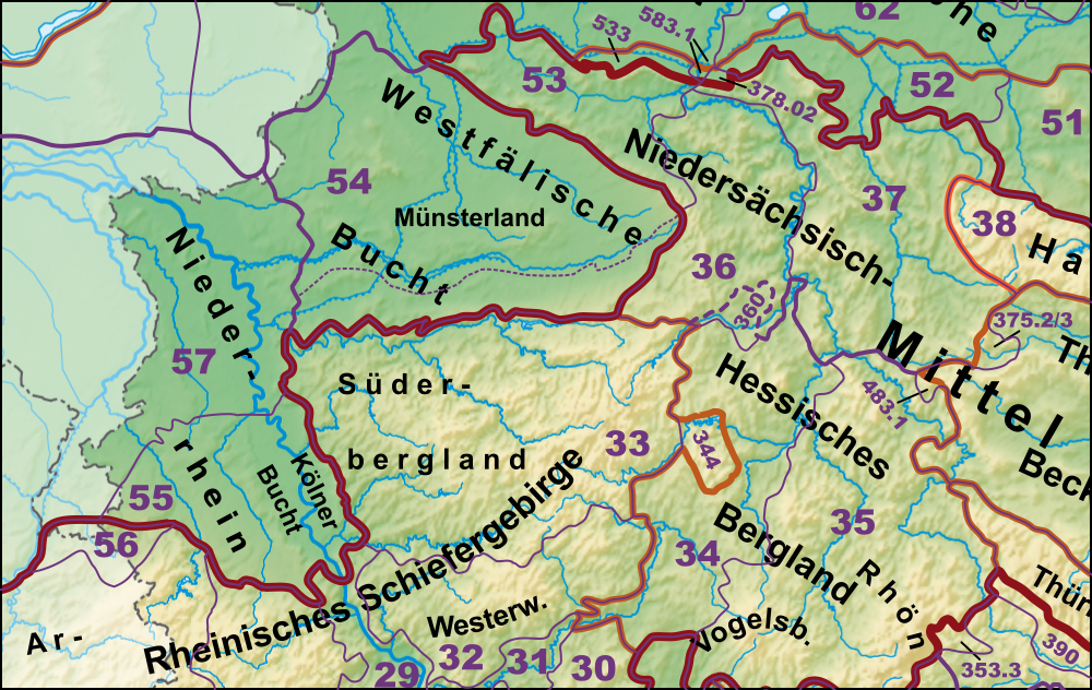 Haupteinheitengruppen im Südwesten des Norddeutschen Tieflandes (Westfälische Bucht, Kölner Bucht, Niederrheinisches Tiefland